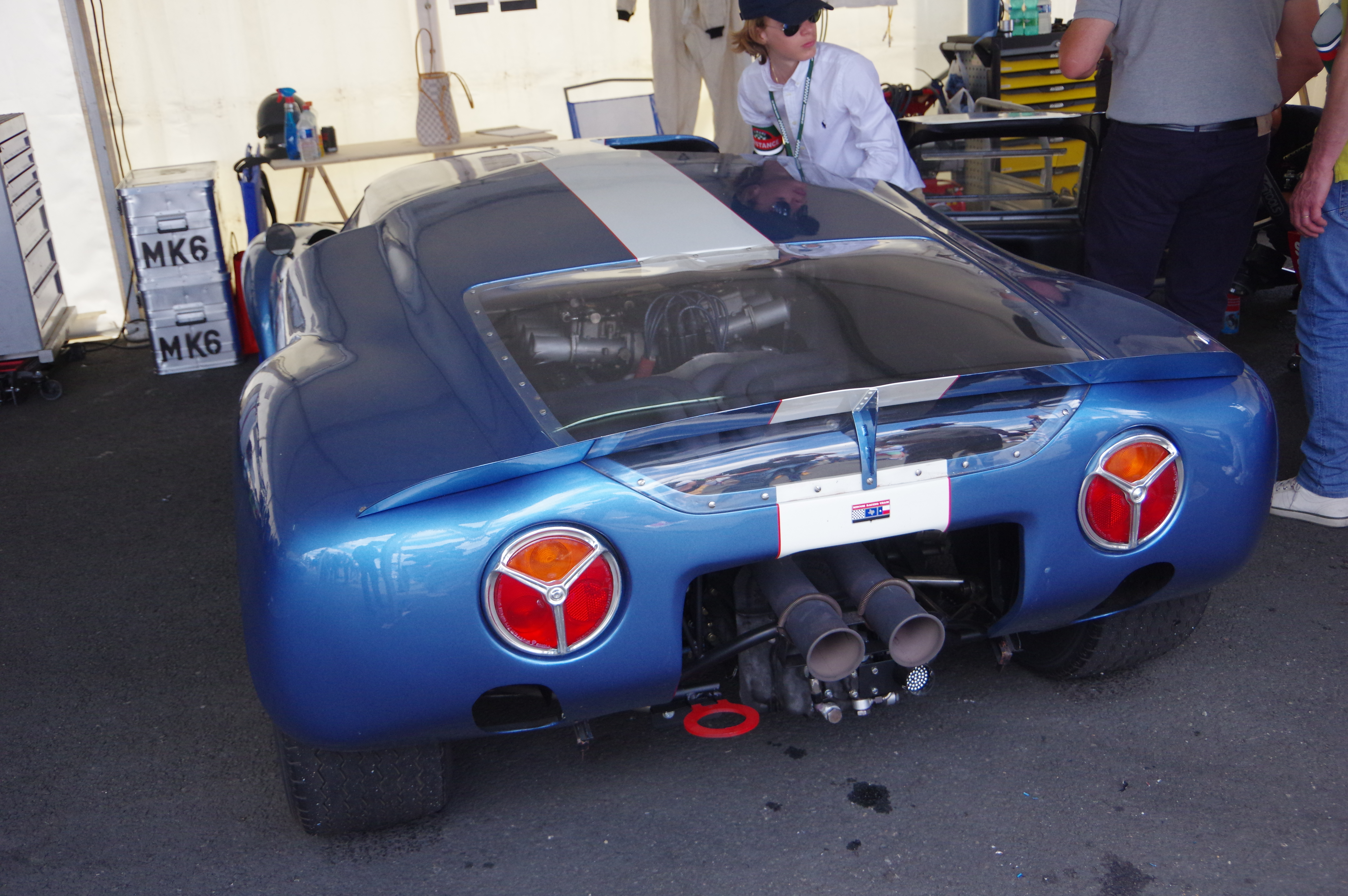 1963 Lola Mk6 GT at Le Mans Classic 2016